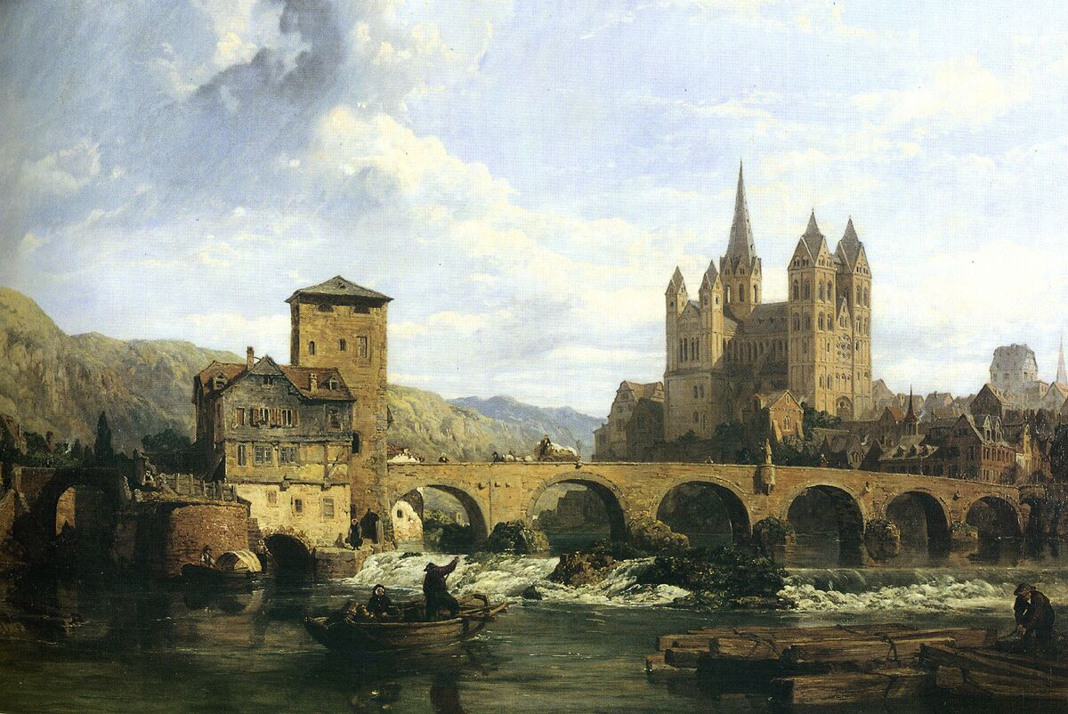 Gemälde von George Clarkson Stanfield (1828-1878) von 1862. Limburg von Westen her gesehen. Zu sehen sind die Alte Lahnbrücke und der Dom.